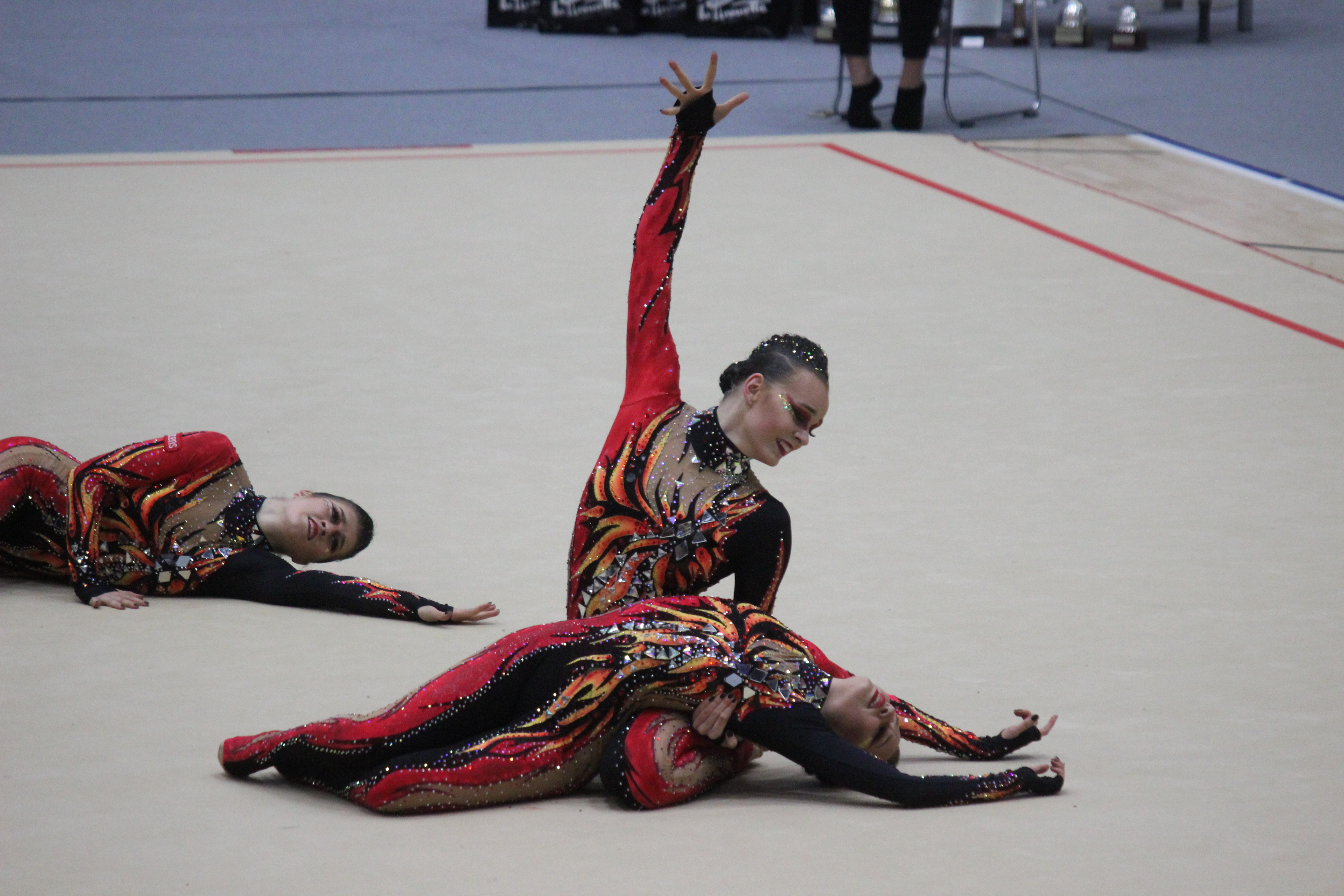 Minetit SM-kilpailuissa 2018, Turussa.